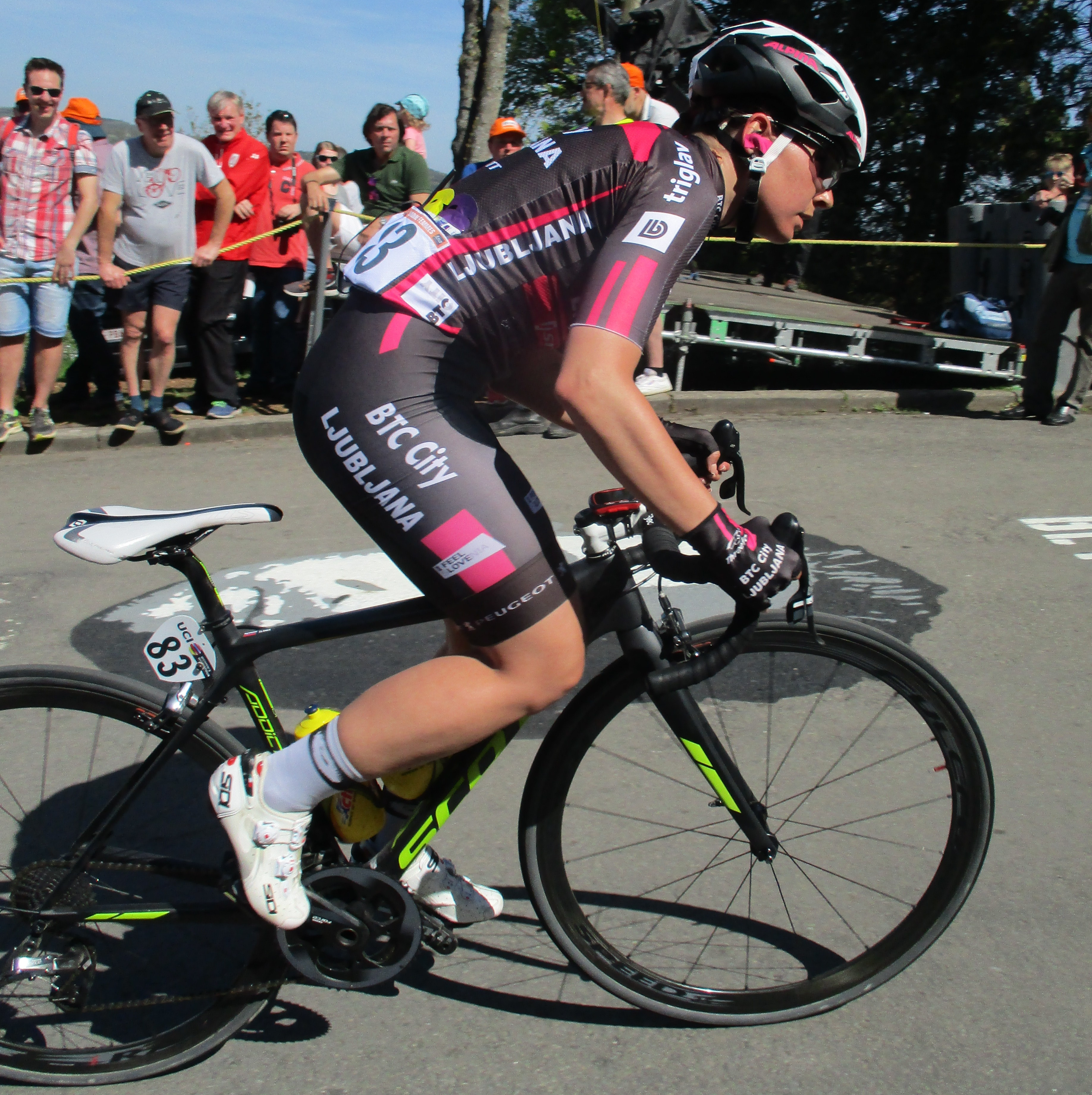 1e passage van de Waalse Pijl 2018 op de Mur van Huy.